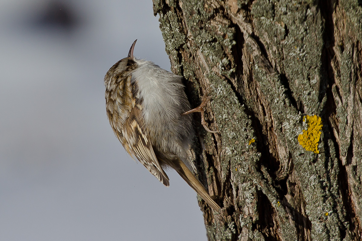 снято в Воронежской области